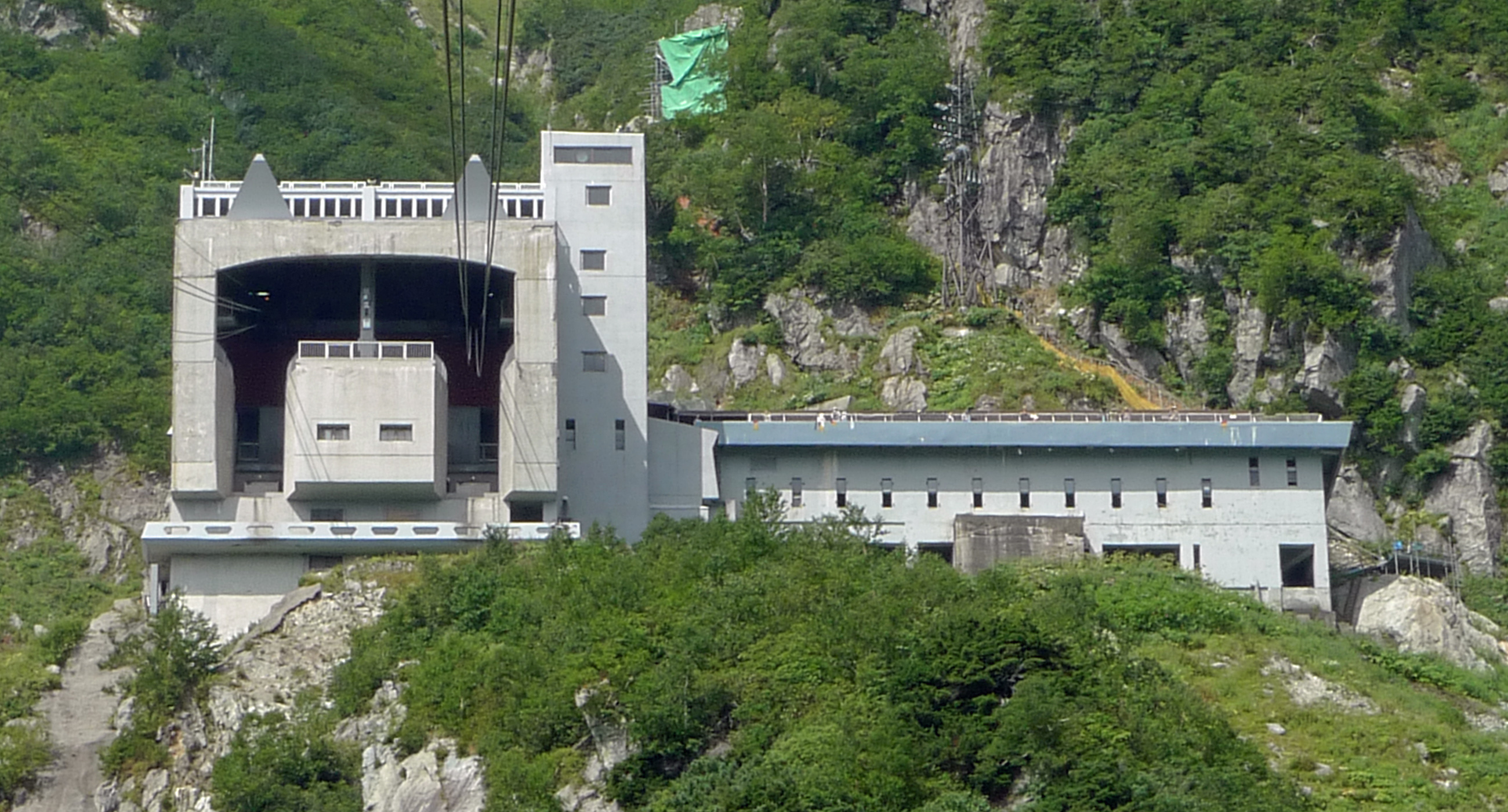 立山ロープウェイ・大観峰駅 近景